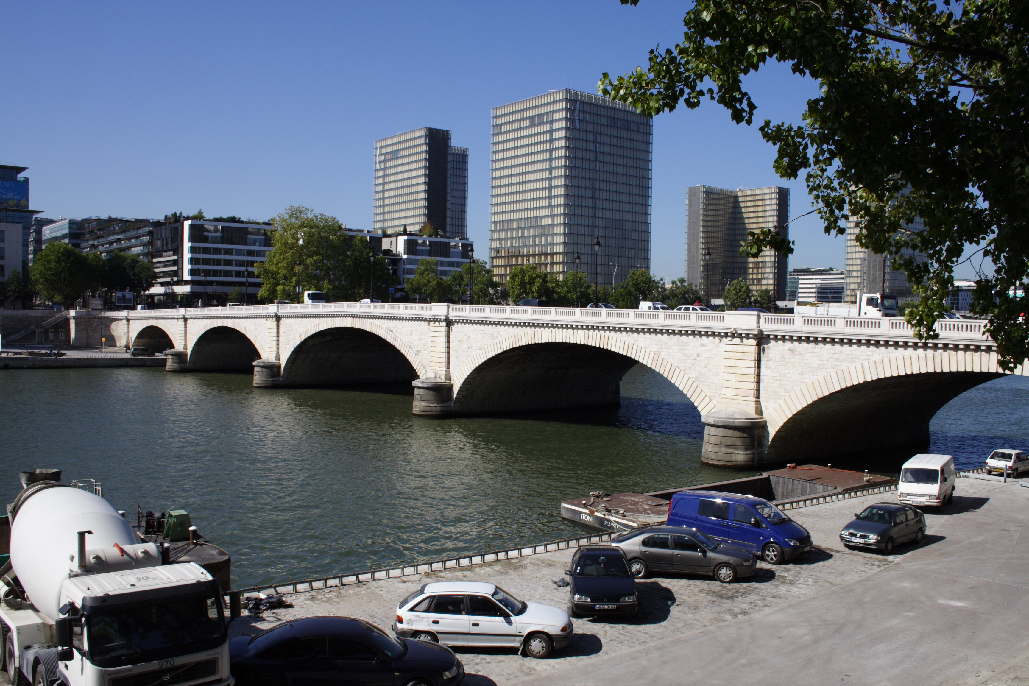 Pont de Tolbiac(Paris, France)